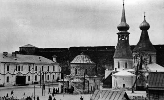 Церкви в Ивангородской крепости. Начало 20 века. Церковь святителя Николая Чудотворца, Церковь во имя Покрова Пресвятой Богородицы, Церковь во имя Успения Пресвятой Богородицы